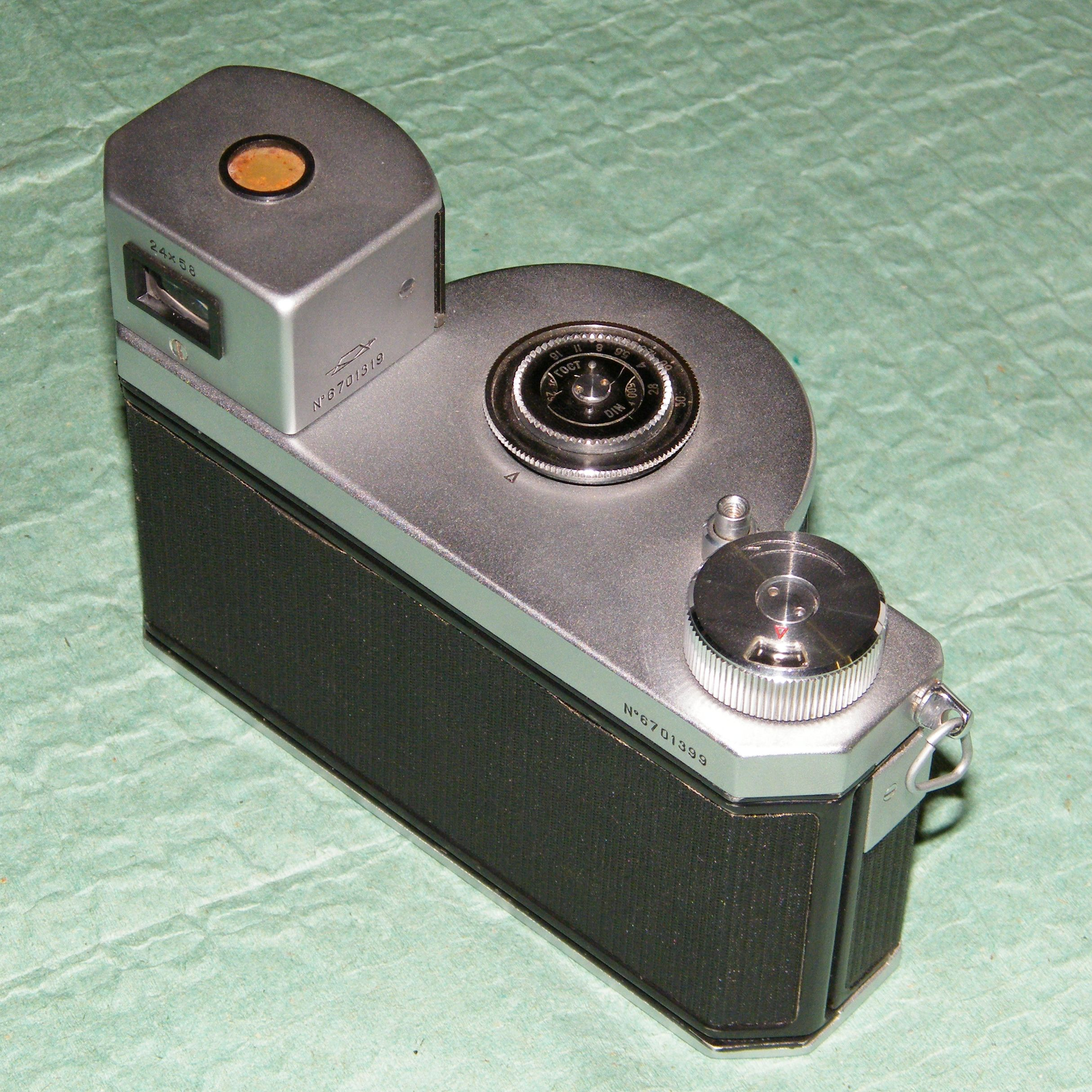 Фотоаппарат Горизонт (КМЗ)